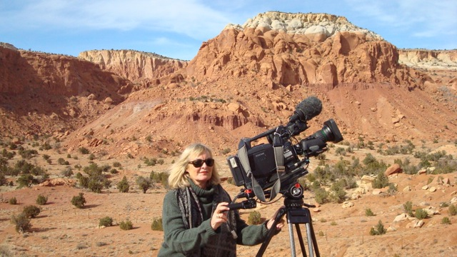 Regisseurin Birgitta Ashoff beim Dreh in New Mexico